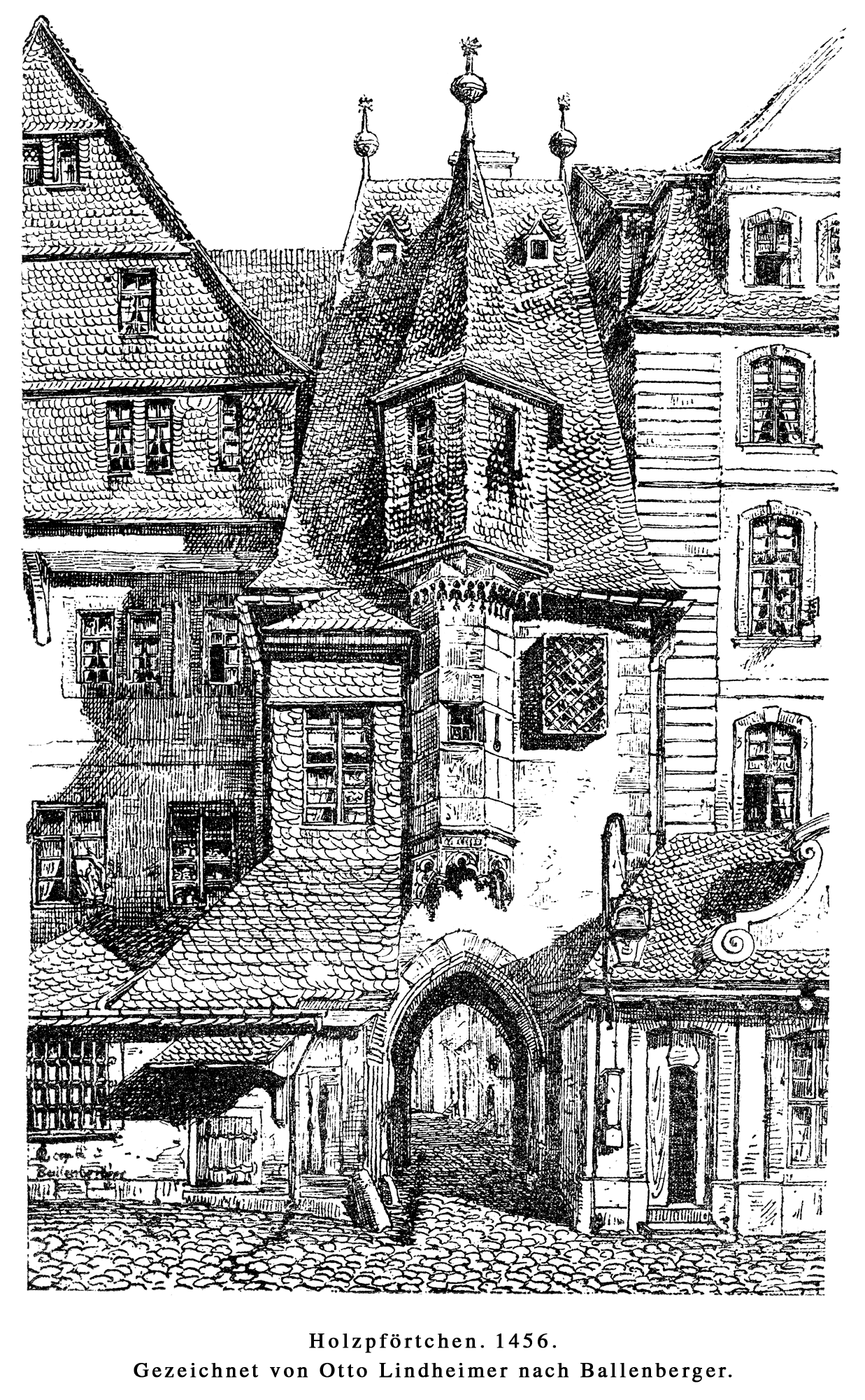 Das 1456 erbaute Holzpförtchen, Teil der ab 1343 in Frankfurt am Main angelegten Stadtmauer der Zweiten Stadterweiterung. Holzschnitt einer Strichzeichnung von Otto Lindheimer, nach einer Skizze von Georg Karl Ballenberger, gescannt.